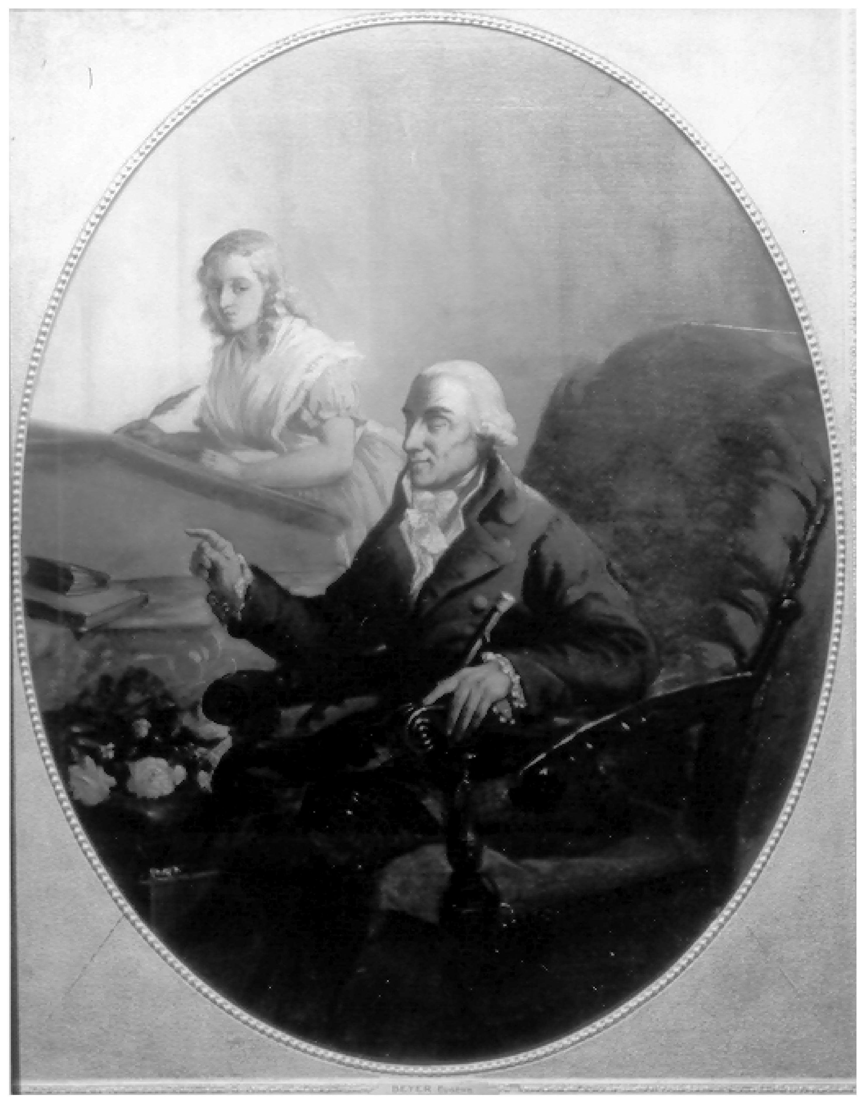 Der fast blinde Gottlieb Konrad Pfeffel (1736-1809) diktiert seiner Tochter: Der Phoenix. An meinen Freund J. G. Jacobi. 1800. In: Taschenbuch für das Jahr 1802. Herausgegeben von Johann Georg Jacobi. Hamburg (Perthes) [1801], 155f. UB Freiburg: E 5188,f